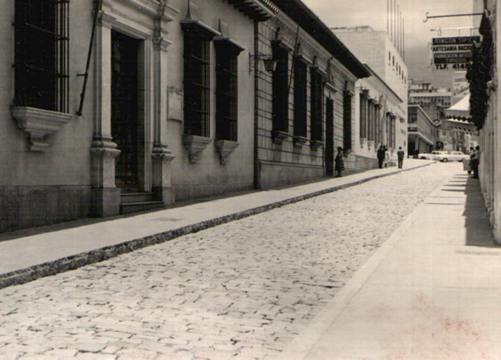 Casa Natal del Libertador Simón Bolívar en Caracas - Venezuela (1967)